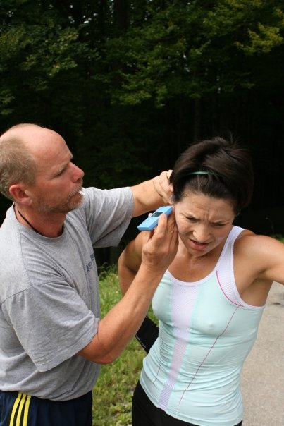 See Title